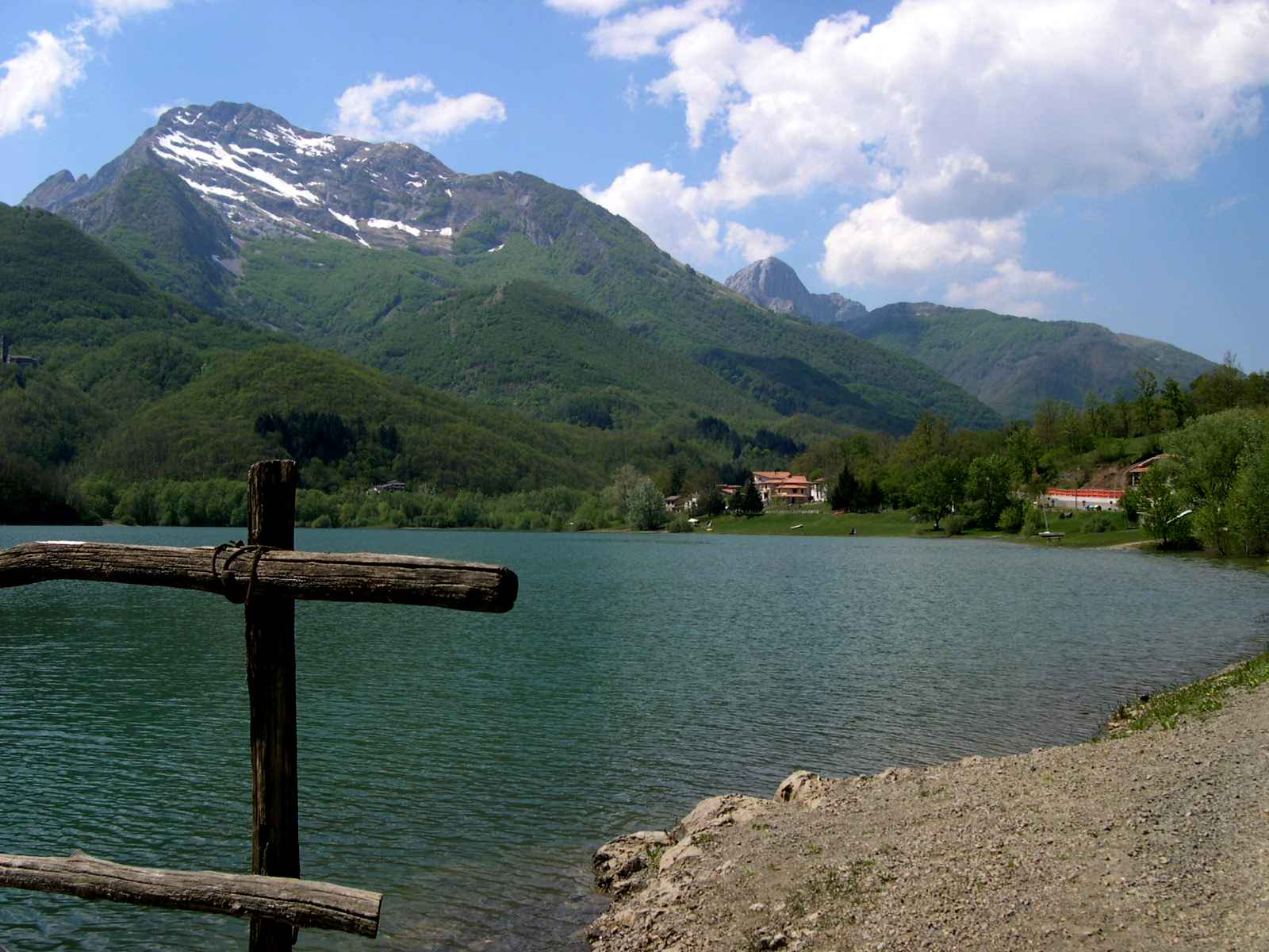 Gramolazzo lake in Minucciano - Italy